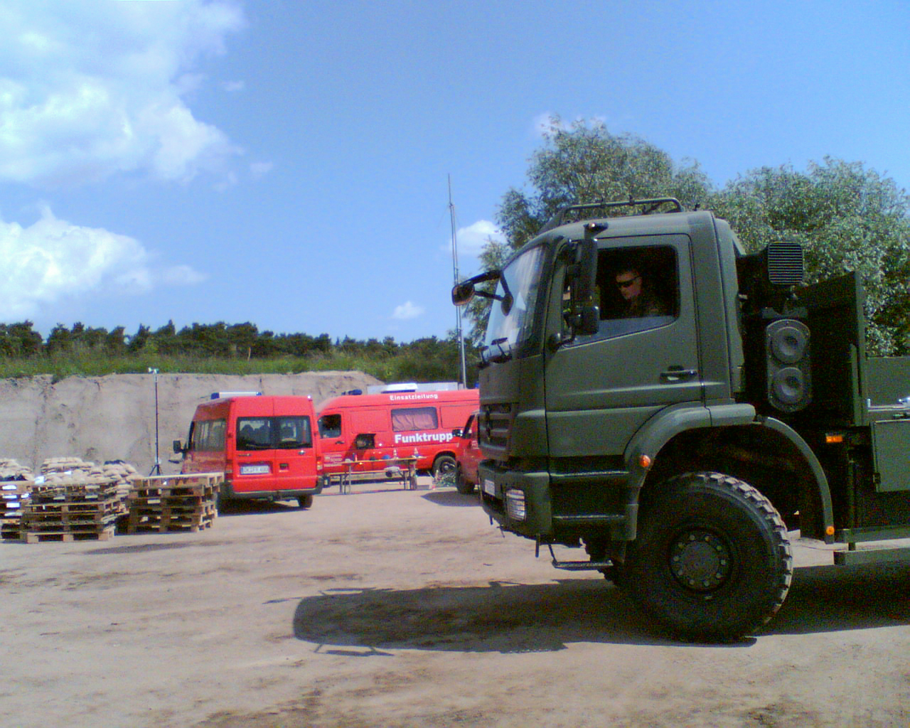 Nutzfahrzeuge in der Kiesgrube Farsleben im Juni 2013. Links: Mannschaftstransportwagen der Freiwilligen Feuerwehr. Mitte: Funktruppkraftwagen (Einsatzleitwagen). Rechts: Lastkraftwagen der Bundeswehr.